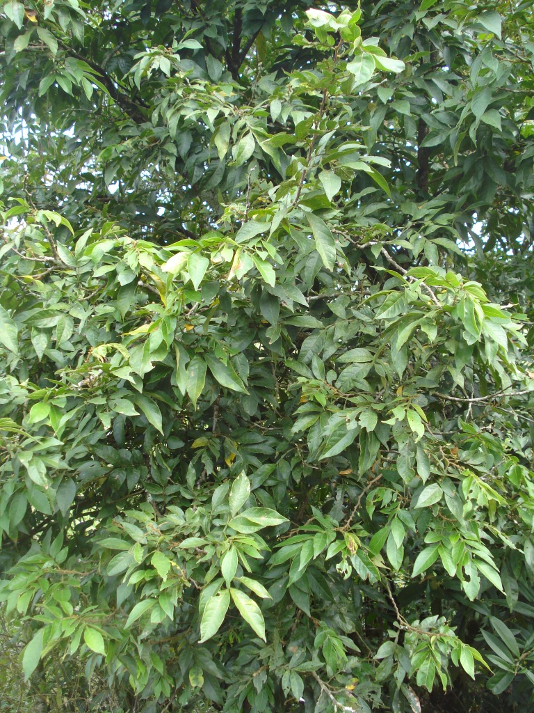 Inga marginata, São Bento do Sul - Santa Catarina